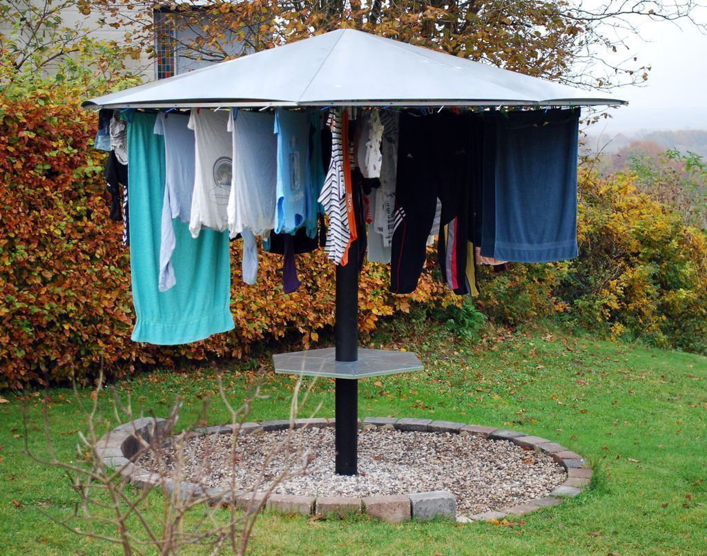 Tørrestative med tag, der holder tøjet tørt selv i regnvejr fra